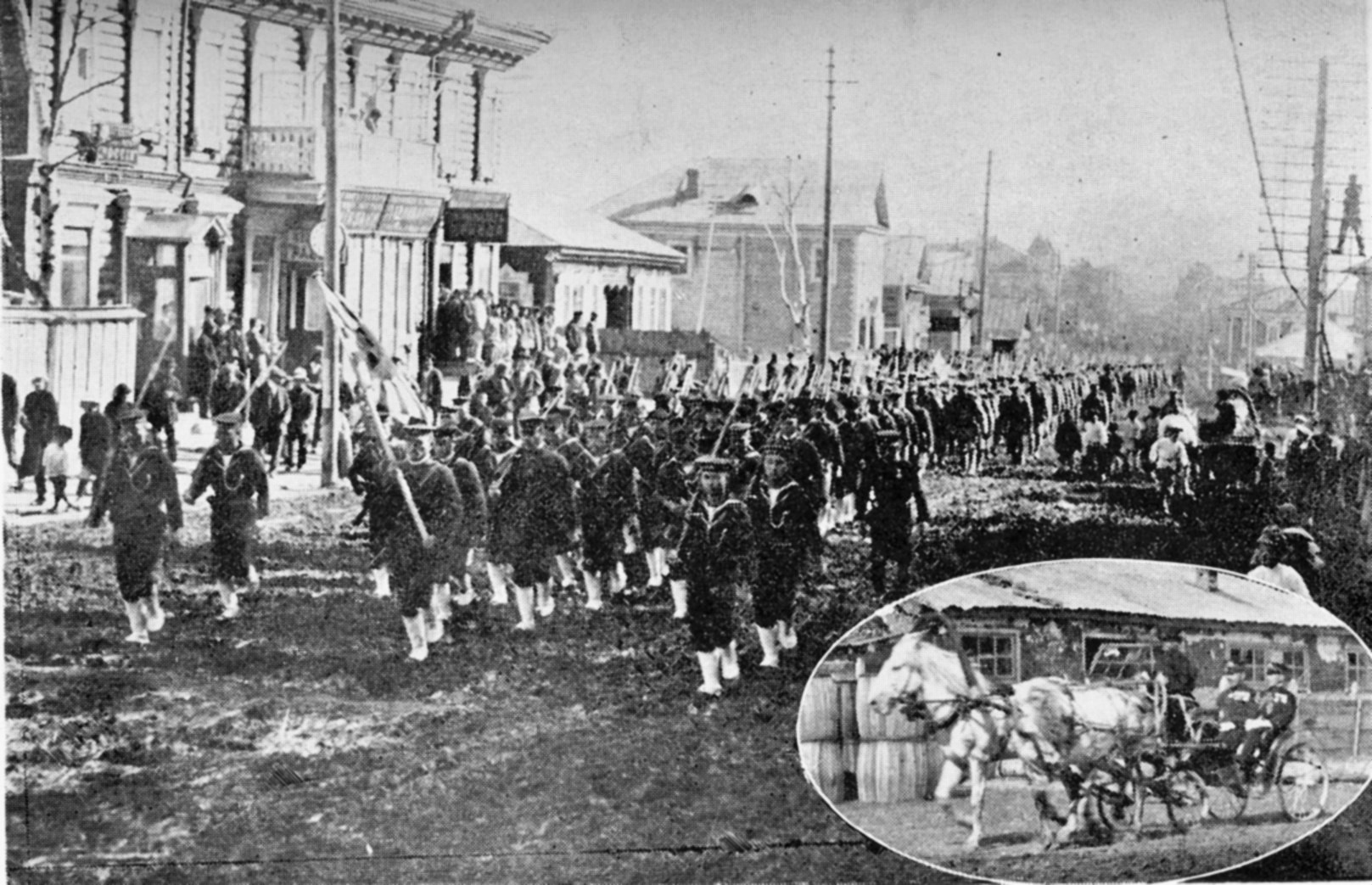 1918年9月、尼港に入市する日本海軍陸戦隊